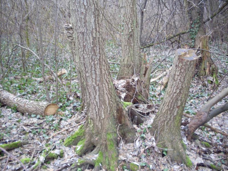 Illegális fakitermelés (Erdőtelki Égerláp Természetvédelmi Terület, Heves megye)